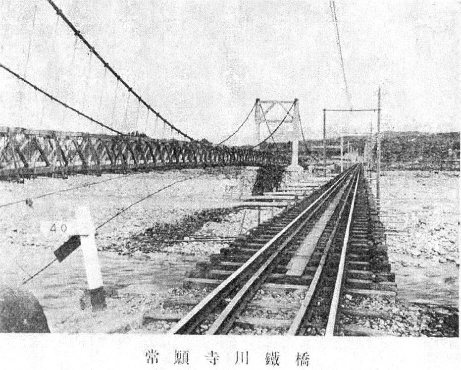 富山県営鉄道上滝公園下 - 岩峅寺間常願寺川鉄橋の写真